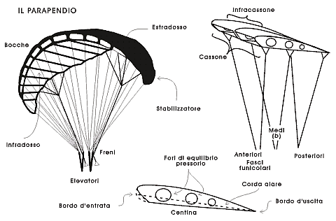 Elementi strutturali del parapendio (da: Andrea De Rosa, [